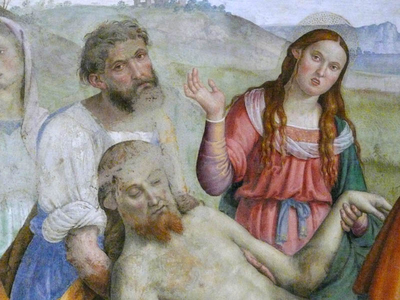 Fresco "Transporto di Cristo al sepolcro", Trevi, Chiesa della Madonna delle Lacrime, Cappella di S. Francesco - detail